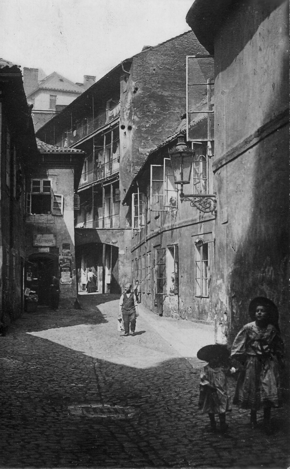 Prager Josefstadt, sogenanntes Durchhaus "Beim Šišling"